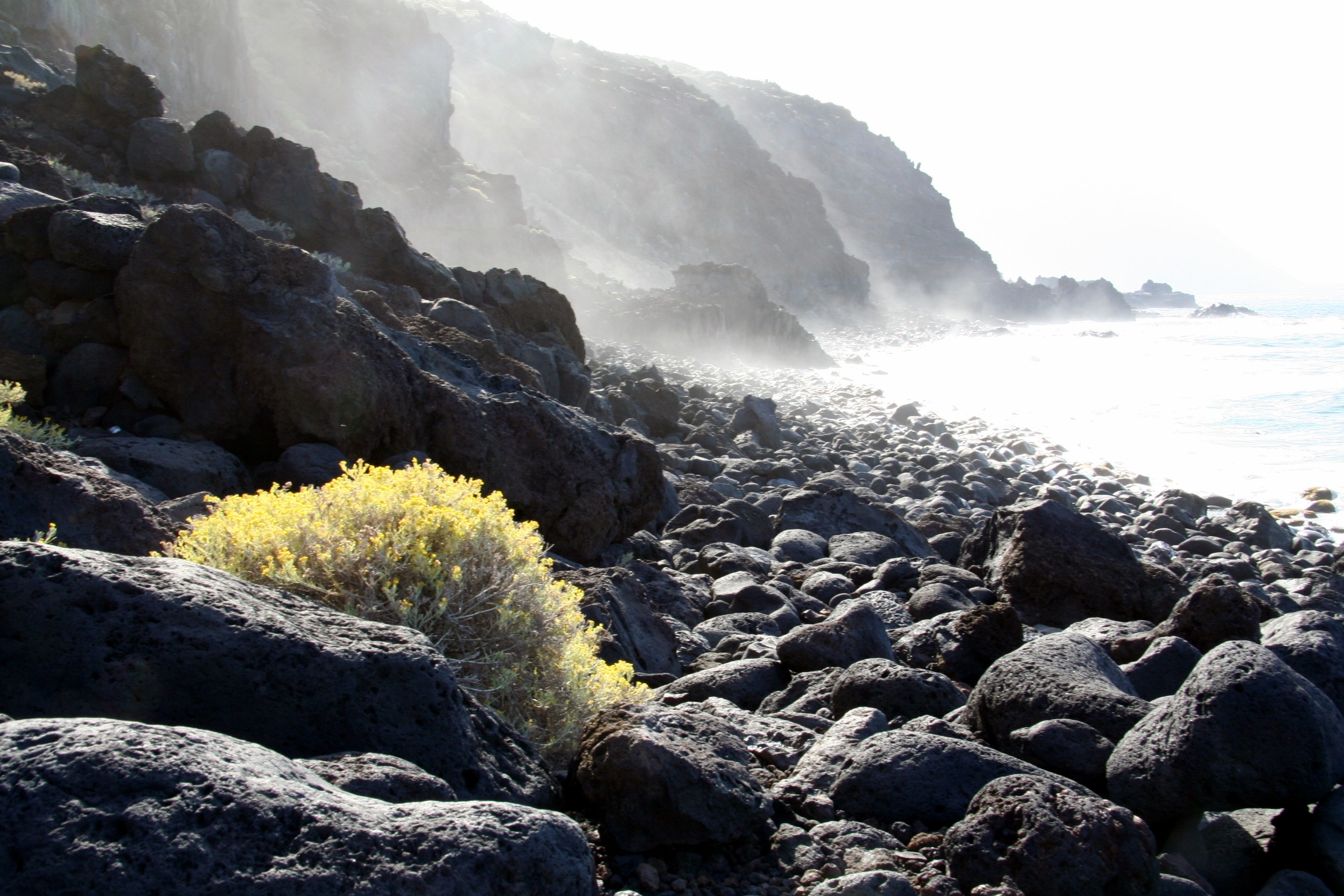 El Hierro, Charco Azul